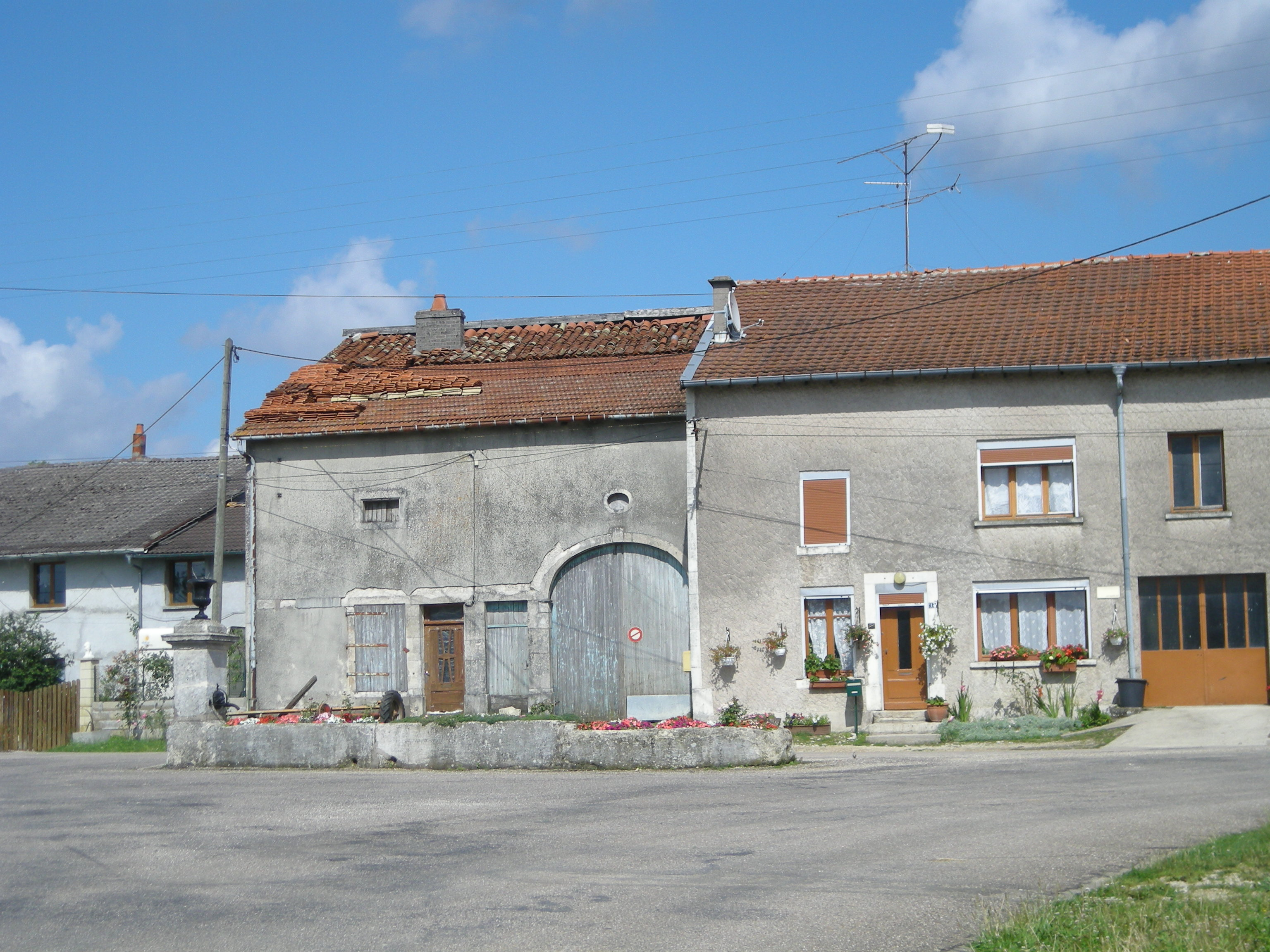 Fontaine-lavoir du 19ème siècle à Gérauvilliers (Meuse, France)